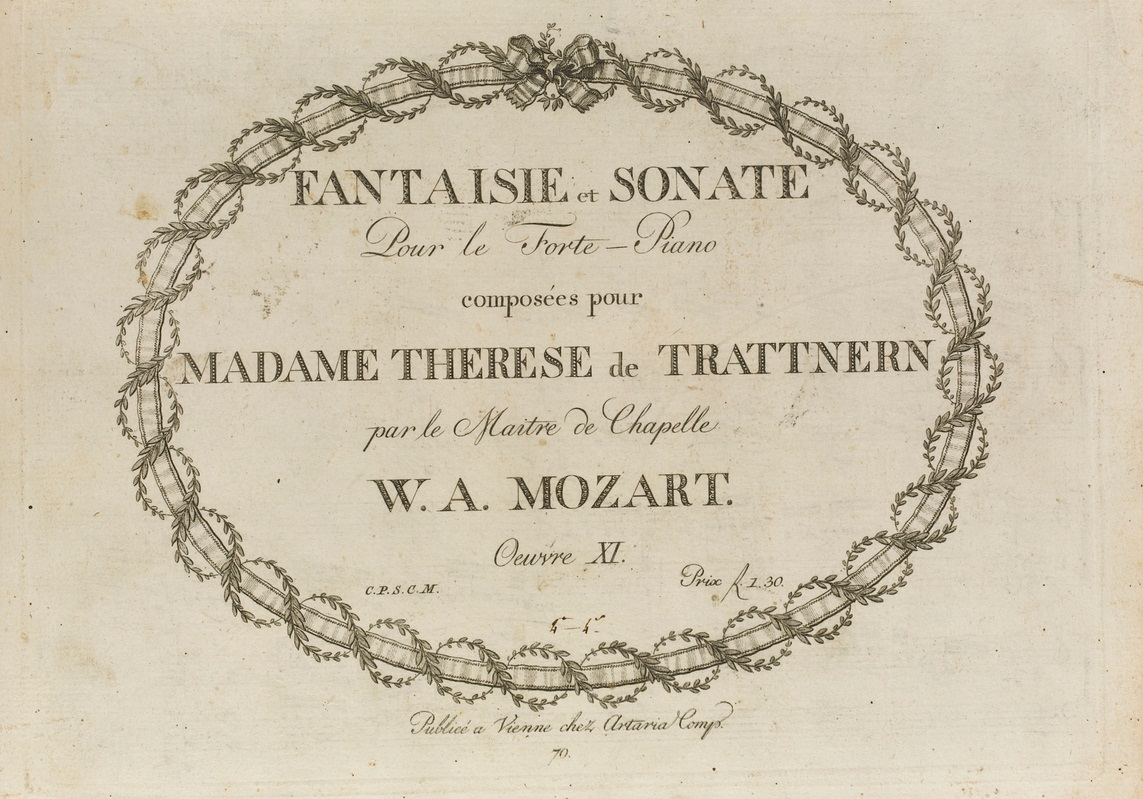 Титульный лист первого издания фантазии K.475 и сонаты K.457.